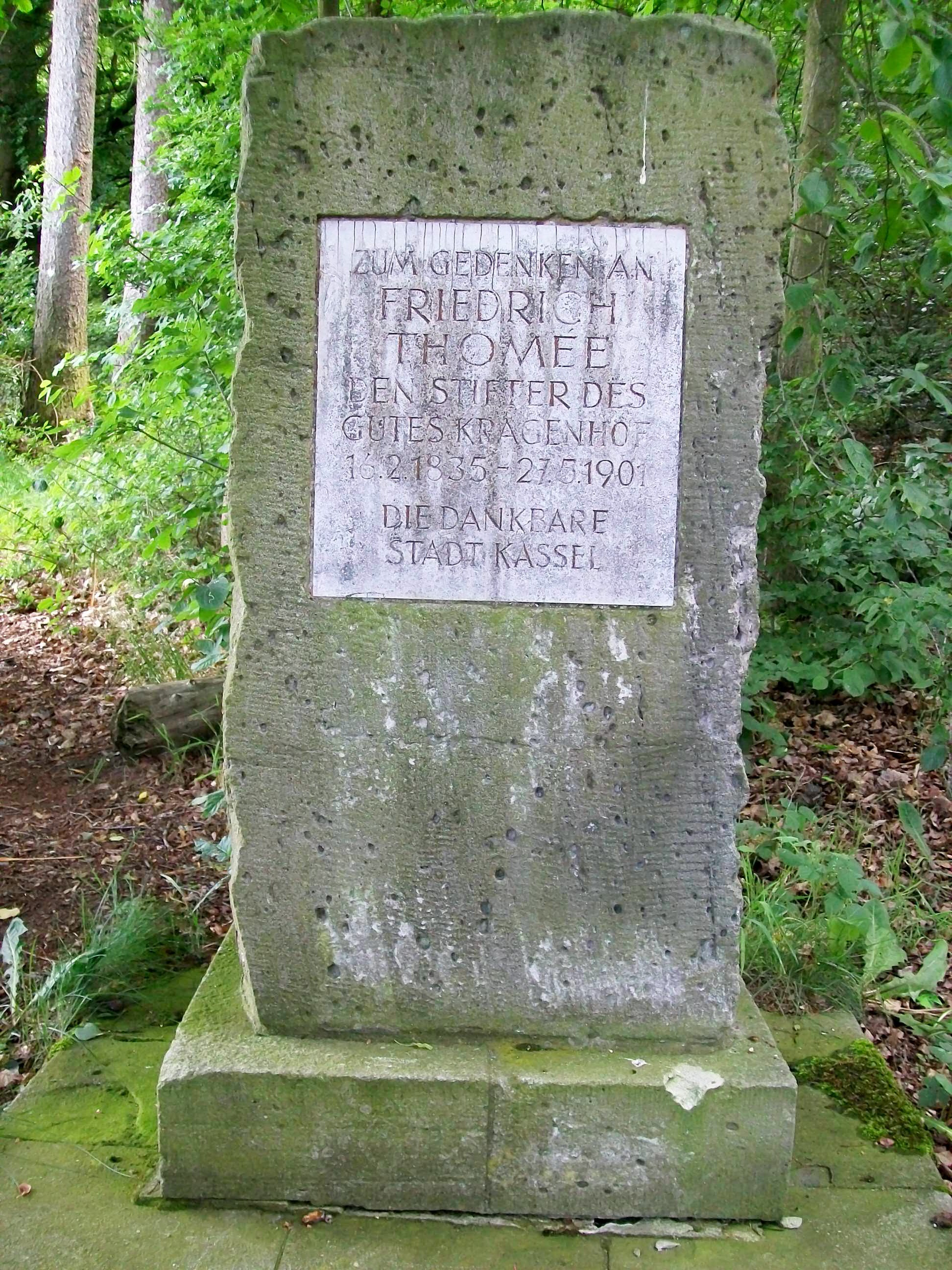 Memorŝtono por Frederiko Thomee sur la Kragenhof-bieno (Kassel, Germanio)